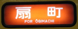 方向幕；扇町